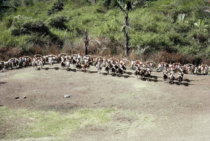 Formatura do Esquadrão para a cerimónia do ARBIRU